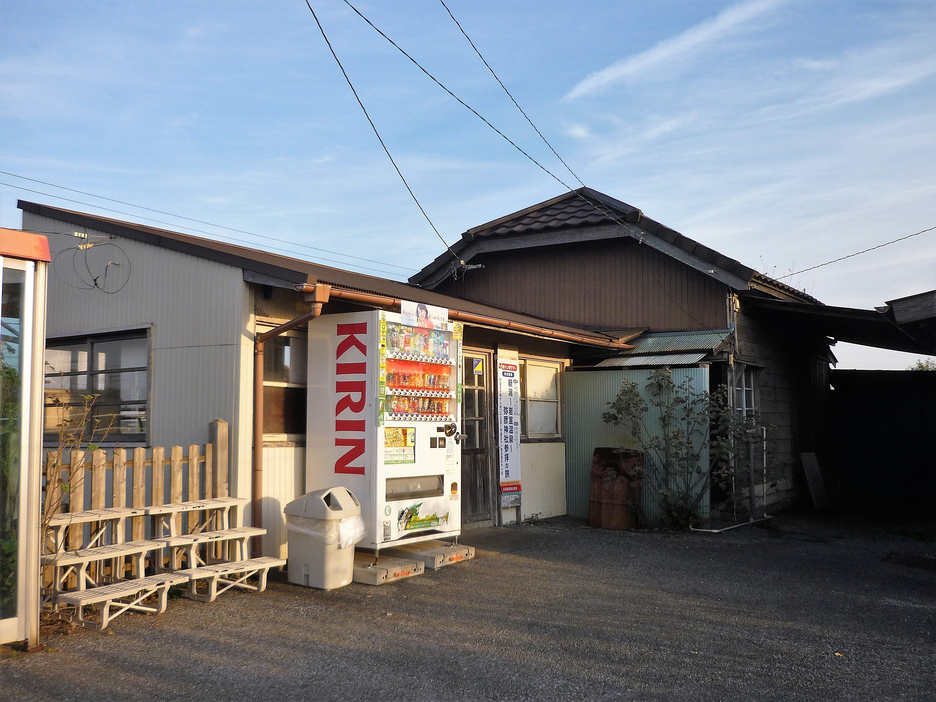 上総村上駅 駅舎 Panasonic Lumix DMC-FS3